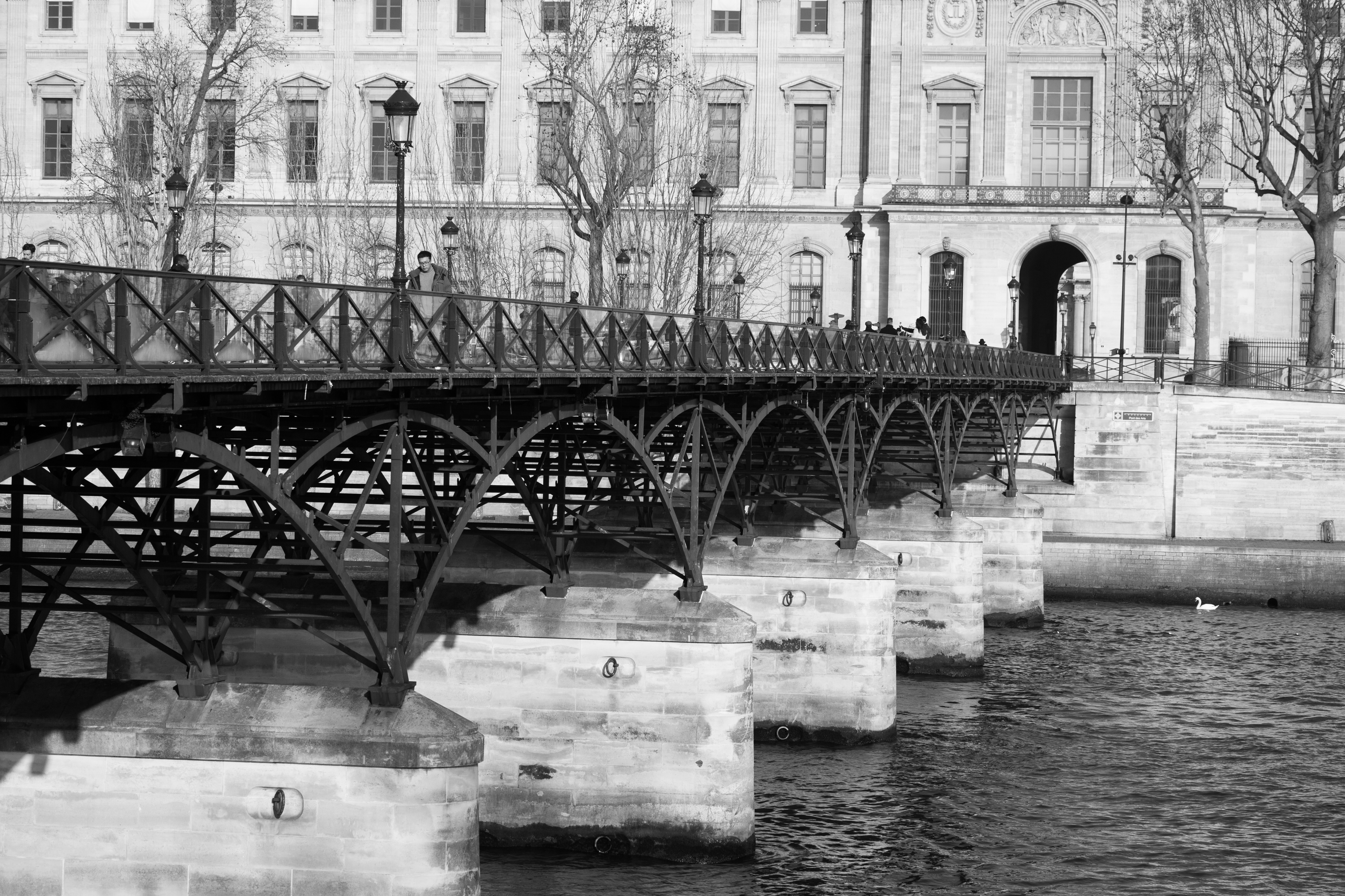 Pont des Arts